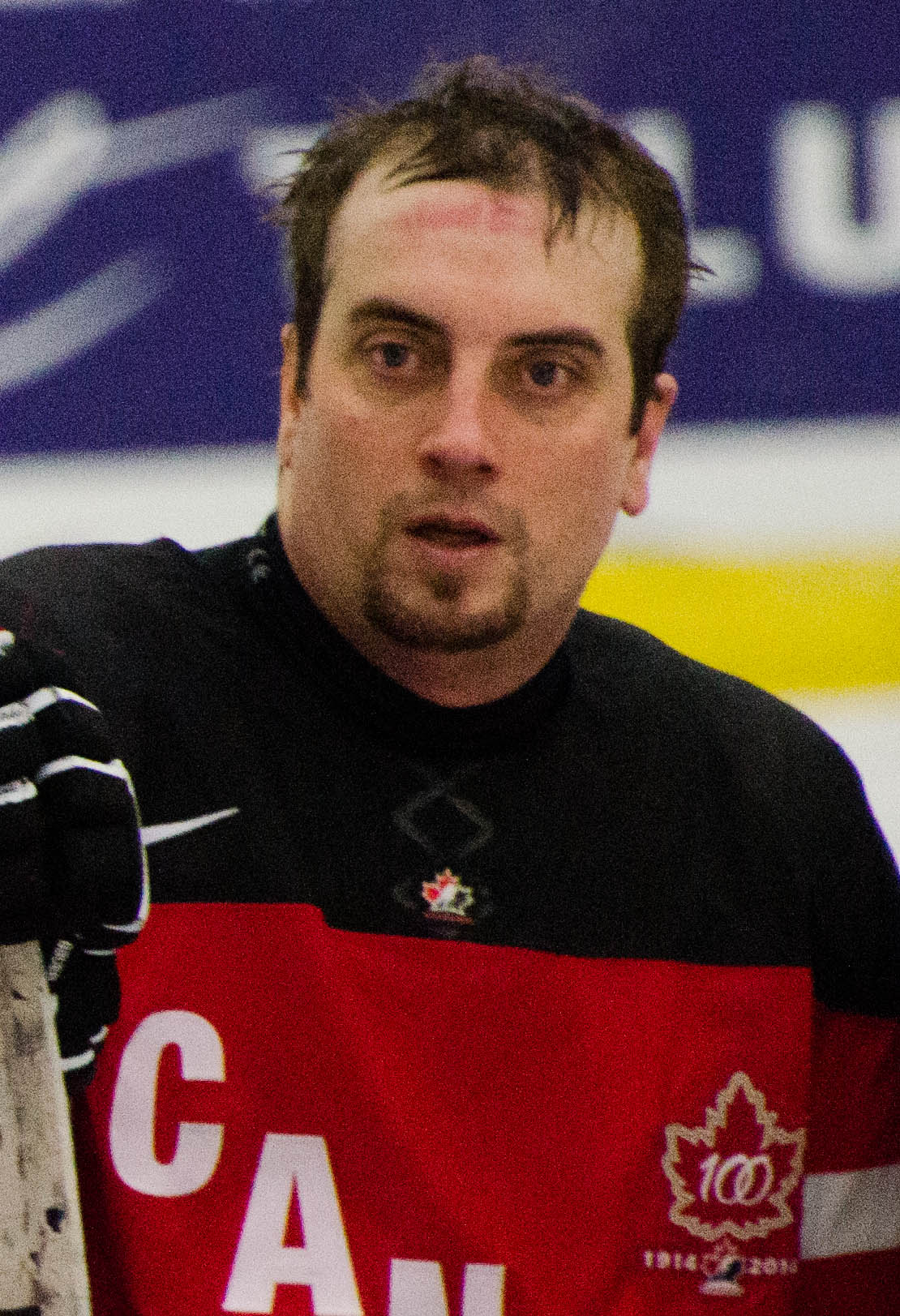 James Gemmell, 2015